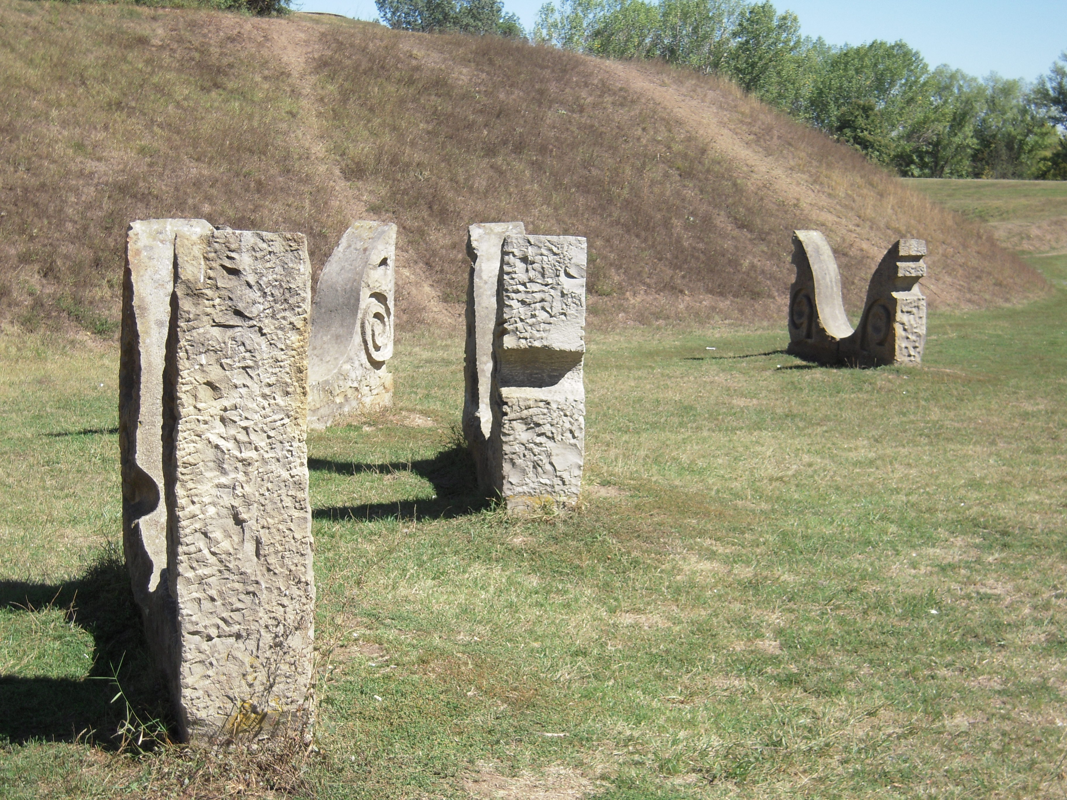 Меморијални комплекс „Слободиште“ у Крушевцу